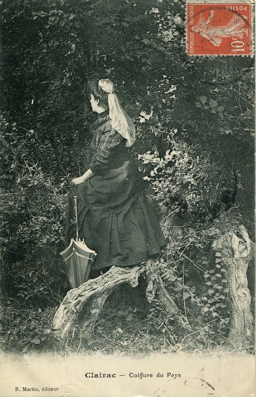 La coiffe de cette femme, représentative des coiffes locales, est particulièrement bien mise en valeur.